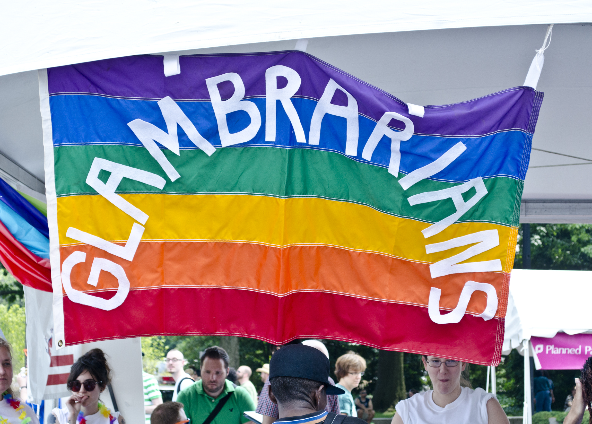 Glambrarians - the LGBT librarians - DC Capital Pride street festival - 2013-06-09